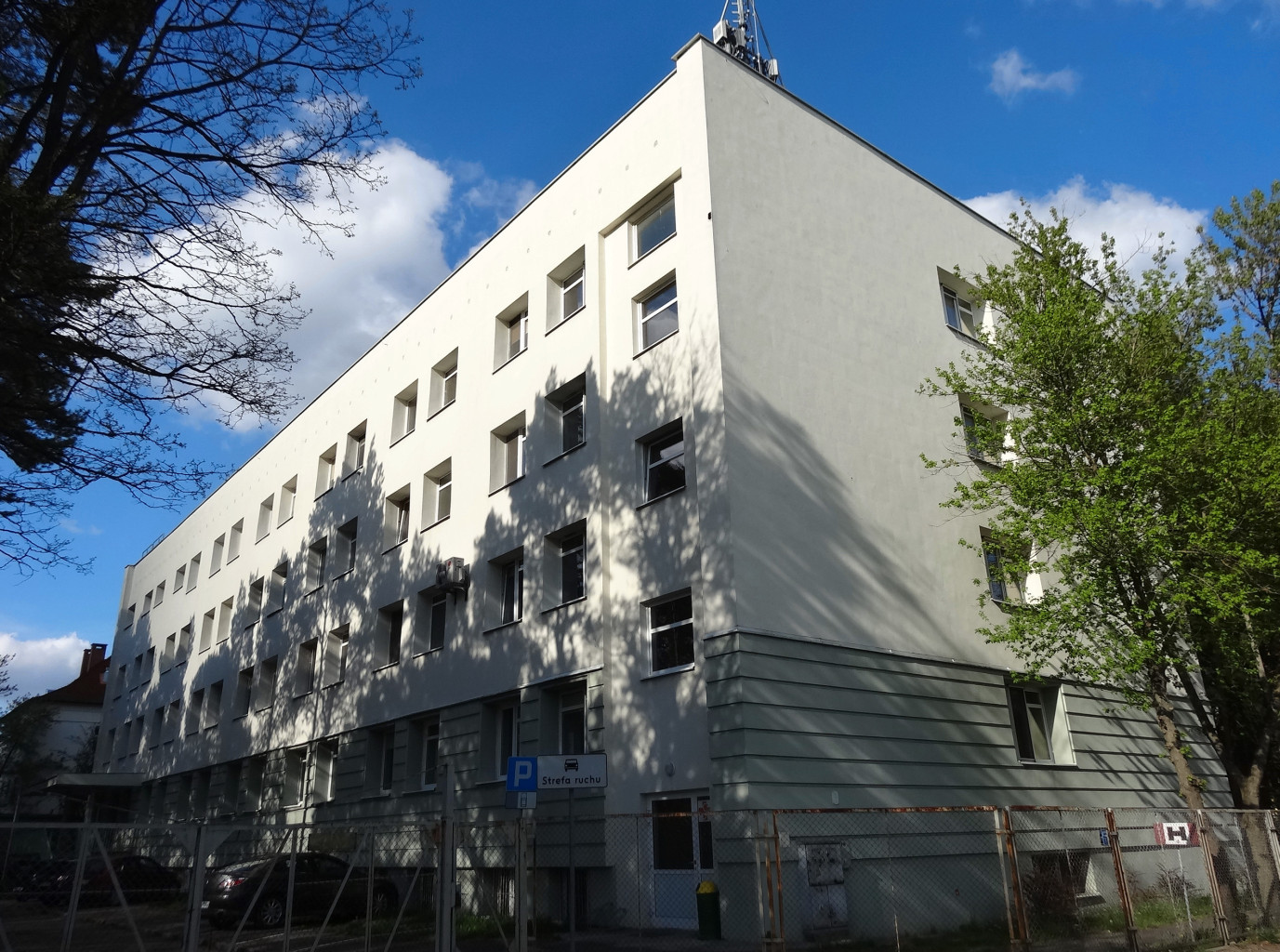 Wielospecjalistyczny Szpital Miejski im. dr. Emila Warmińskiego w Bydgoszczy przy ul. Szpitalnej 19